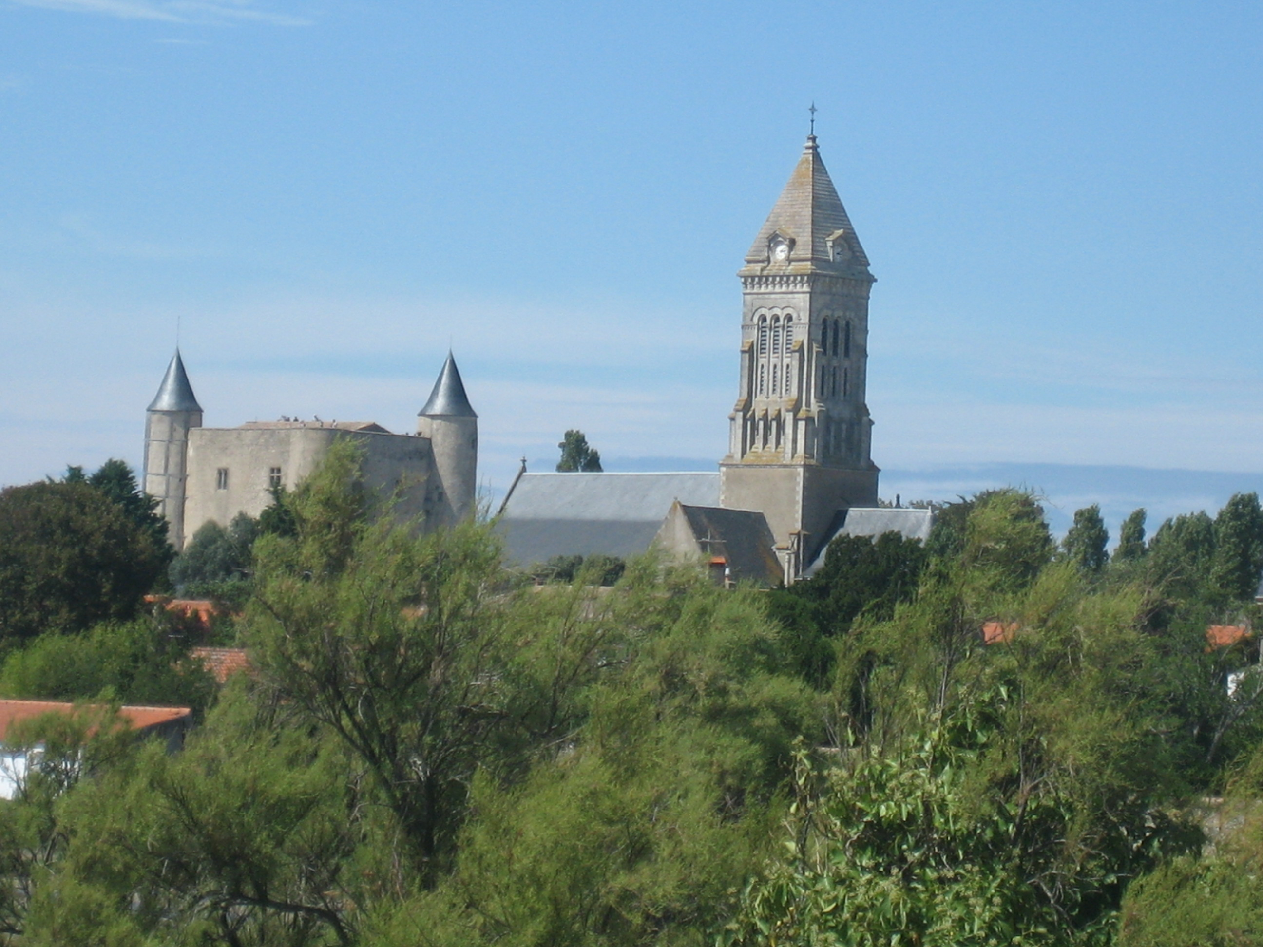 Noirmoutier.